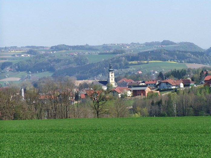 Blick vom Süden auf Waizenkirchen